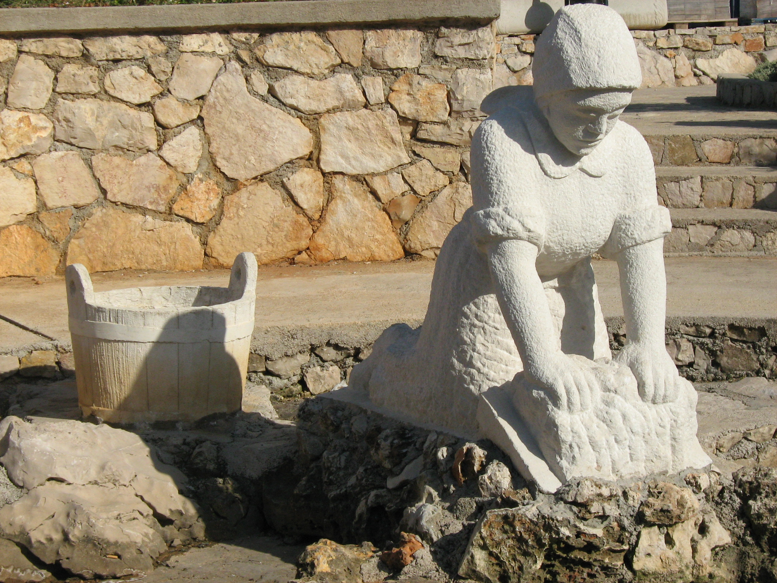 Kip Naša mati u spomen na priješke lavandijere